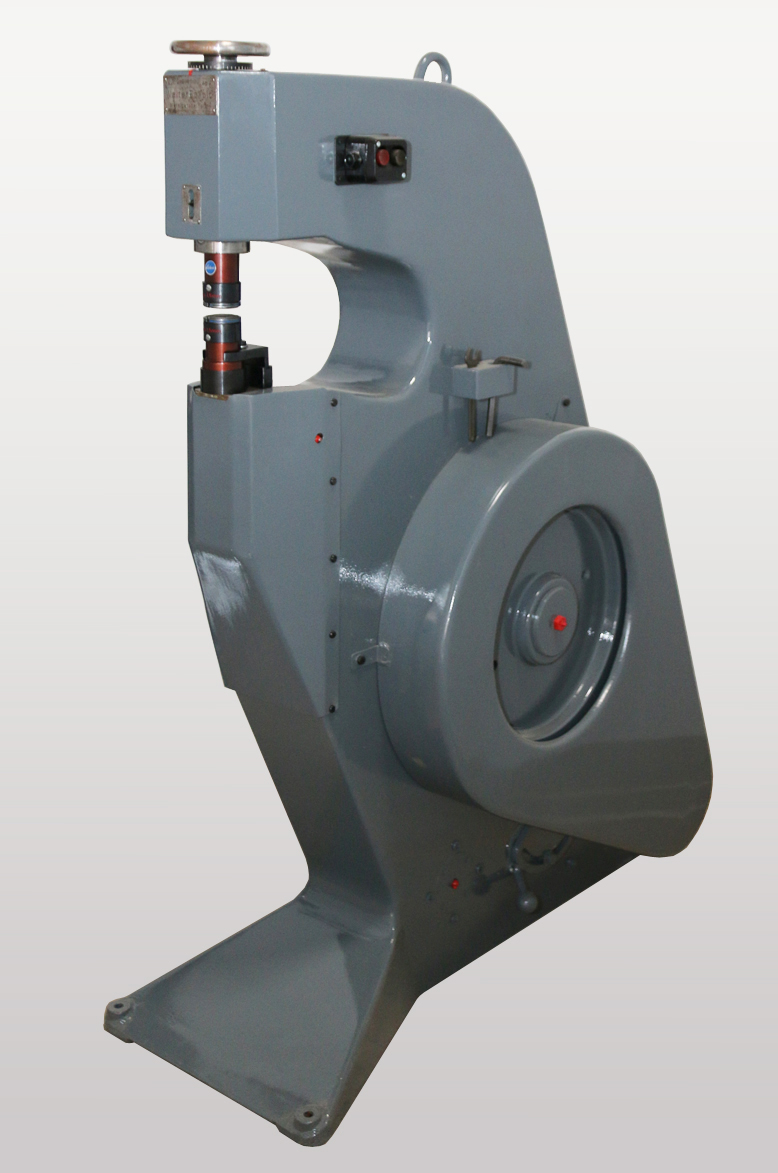 Erste Eckold Stauchmaschine VL2-1 von 1941